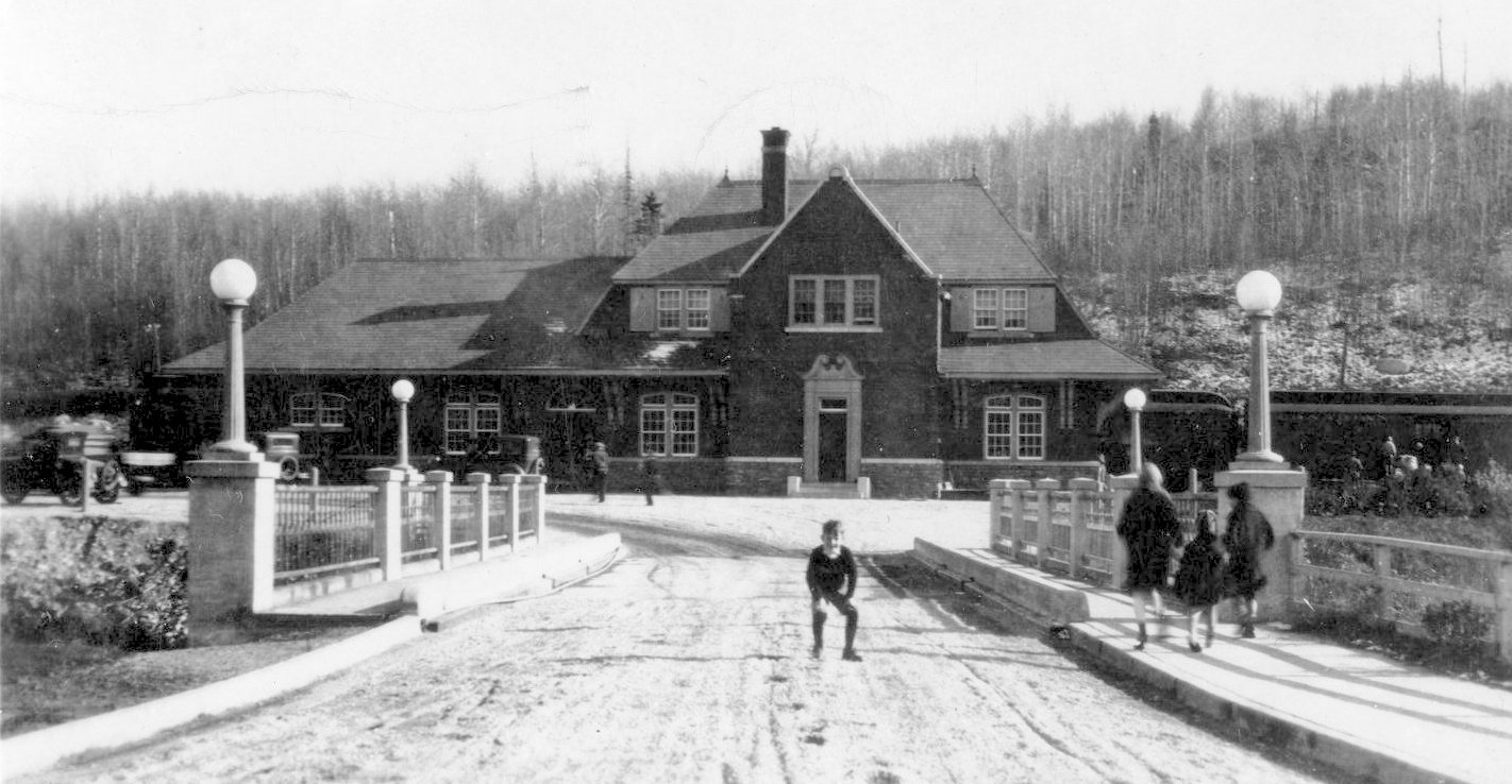 Titre : C.P.R. Station, Temiskaming, Que. [image fixe] Éditeur : [Québec (Province)? :s.n., Genre : Cartes postales Sujet : Témiscaming (Québec) Provenance : Ex. de conservation : Collection Jacques-Poitras Description matérielle : 1 carte postale : n. et b.